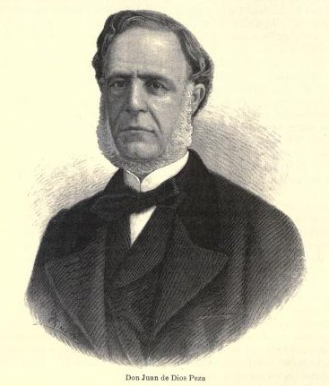 Juan de Dios Peza, político, poeta y escritor mexicano